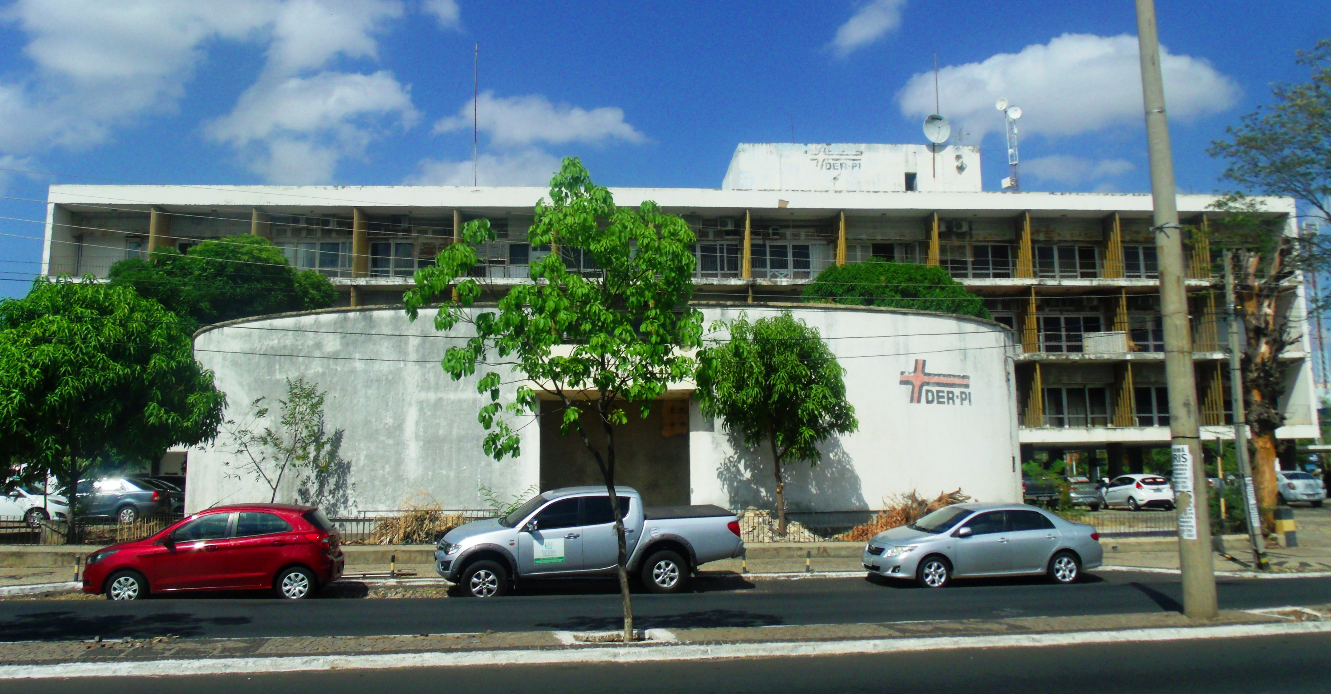 Sede do Departamento de Estradas de Rodagem do Piauí em Teresina.